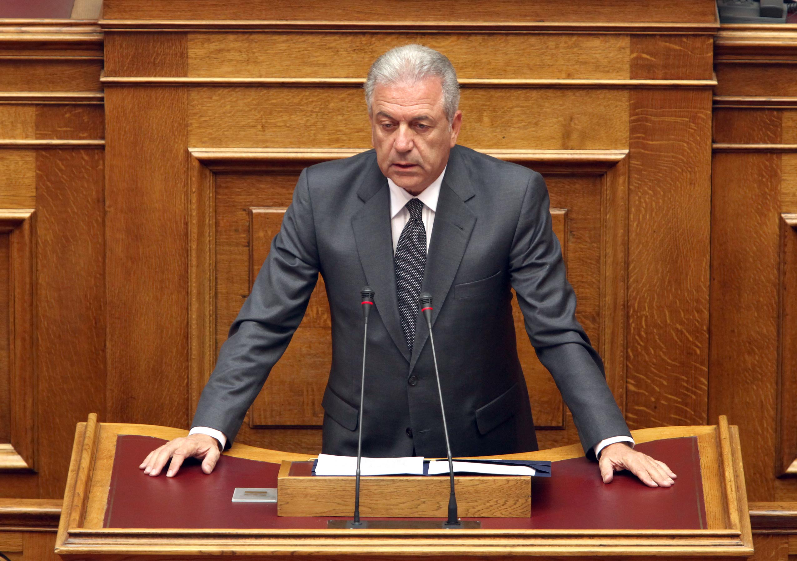 Απάντηση Υπουργού Εξωτερικών Δ. Αβραμόπουλου σε επίκαιρη ερώτηση βουλευτή του ΠΑΣΟΚ Α. Λοβέρδου. Πηγή:Π.Στόλης